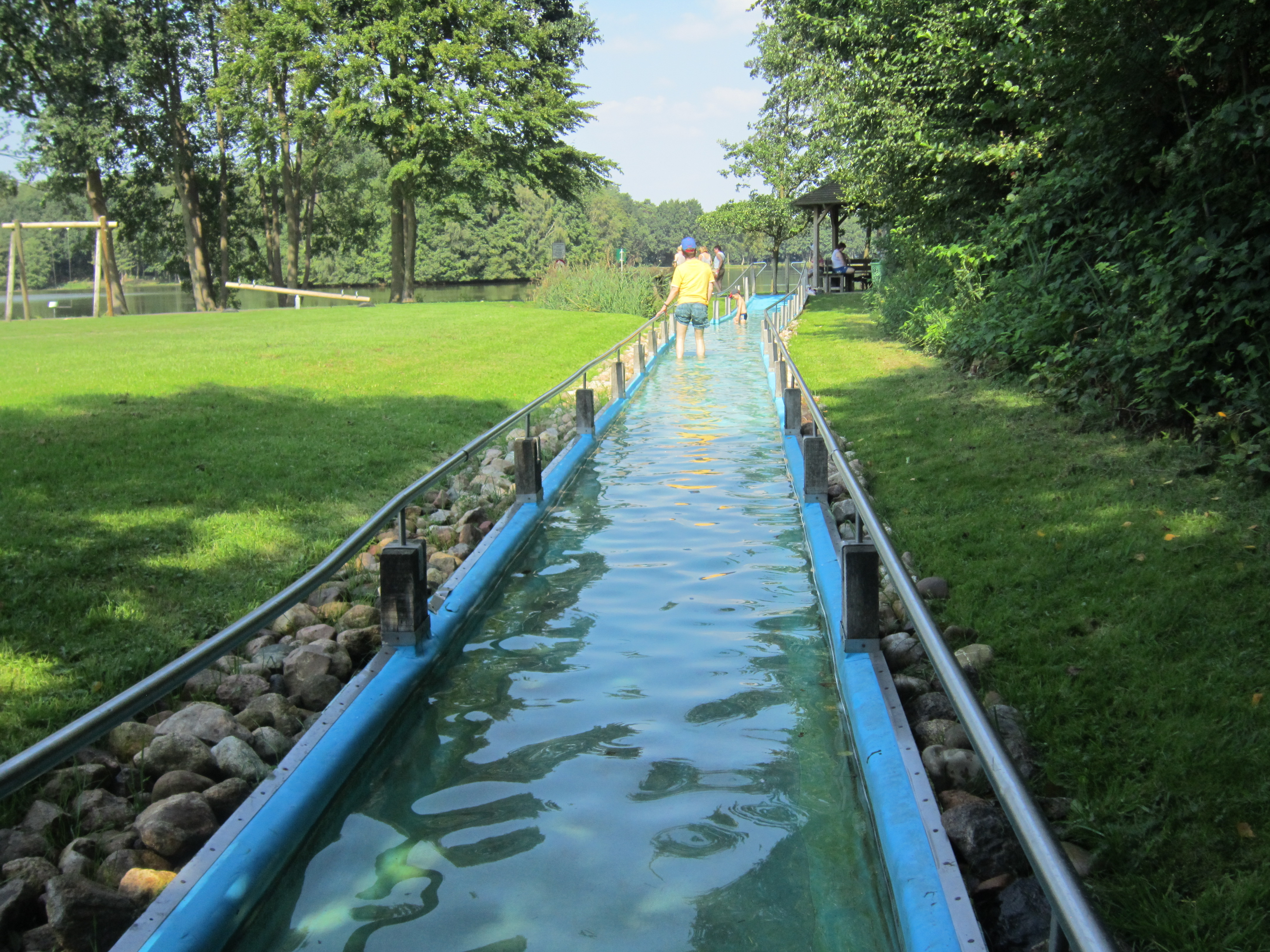 Kneipp-Anlage am Sallersee (Gemeinde Freren, Landkreis Emsland in Niedersachsen)